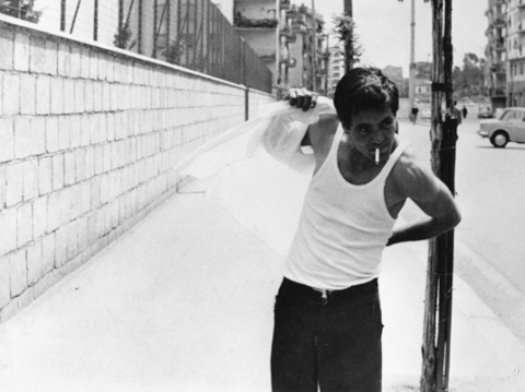 Accattone